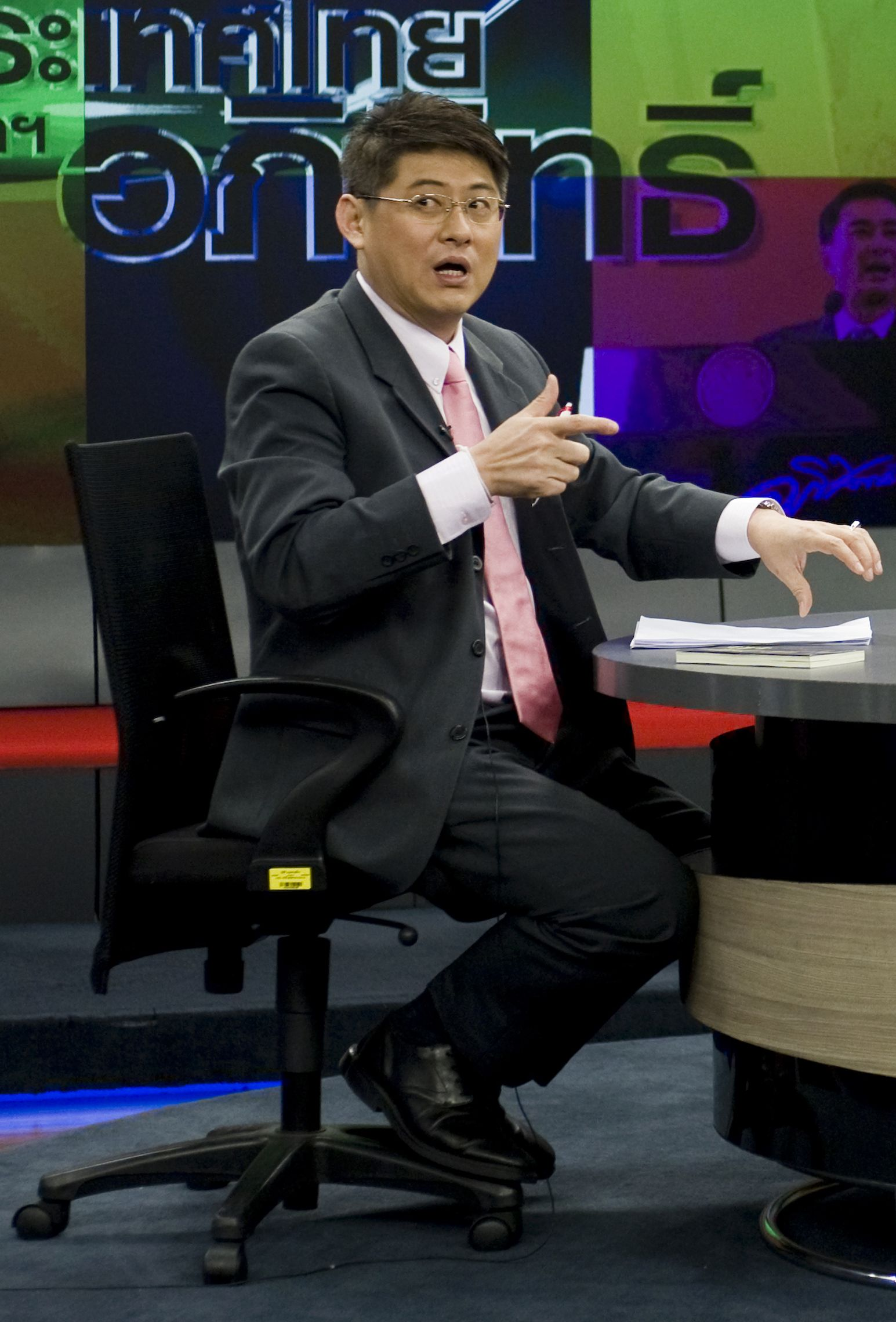 สรยุทธ สุทัศนะจินดา / นายกรัฐมนตรี ออกอากาศสดรายการเชื่อมั่นประเทศไทยกับนายกอภิสิทธิ์ ณ อาคารมาลีนนท์ พระราม4 4ตุลาคม2552 (The Official Site of The Prime Minister of Thailand Photo by พีรพัฒน์ วิมลรังครัตน์)